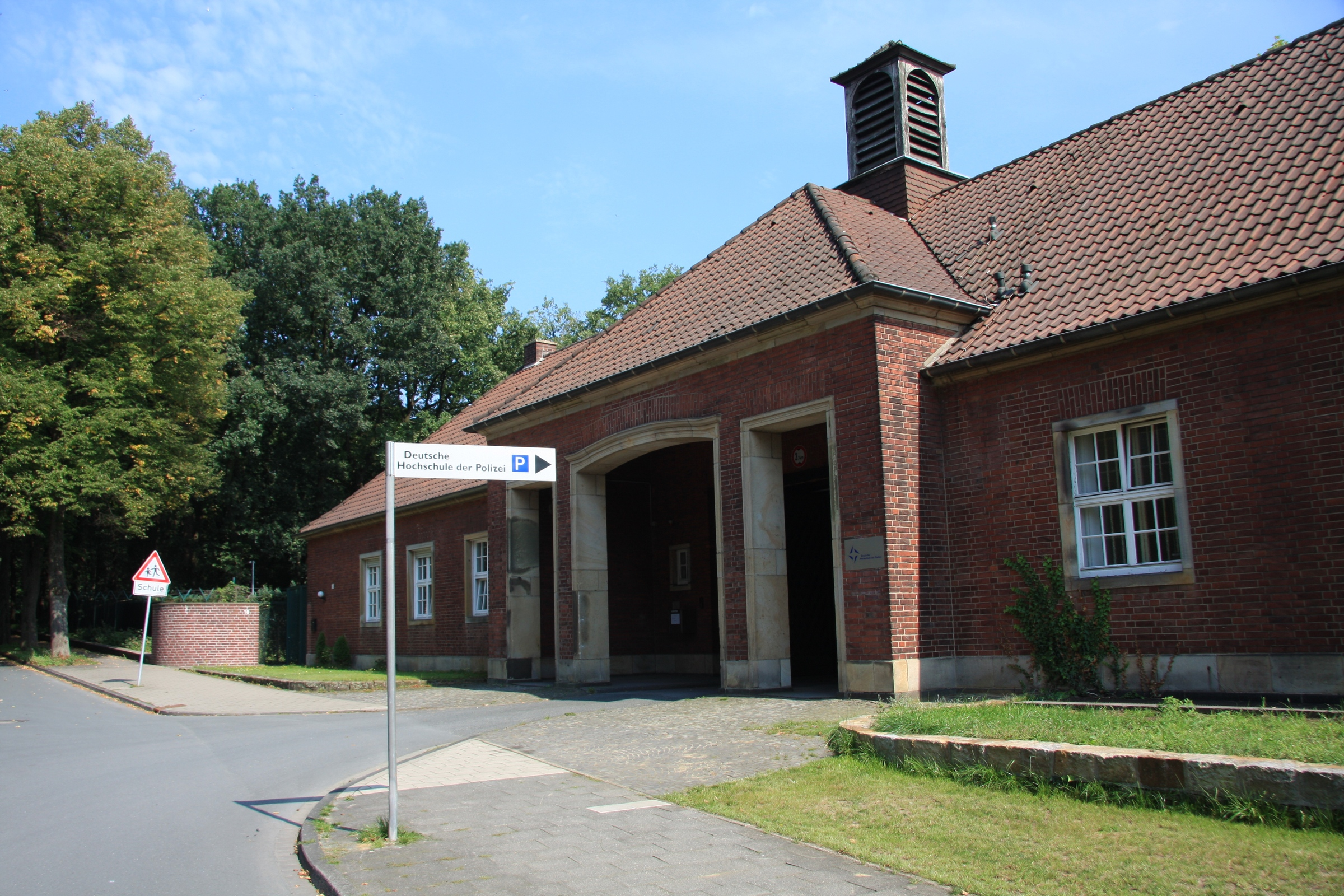 Das Eingangstor zur Deutschen Hochschule der Polizei